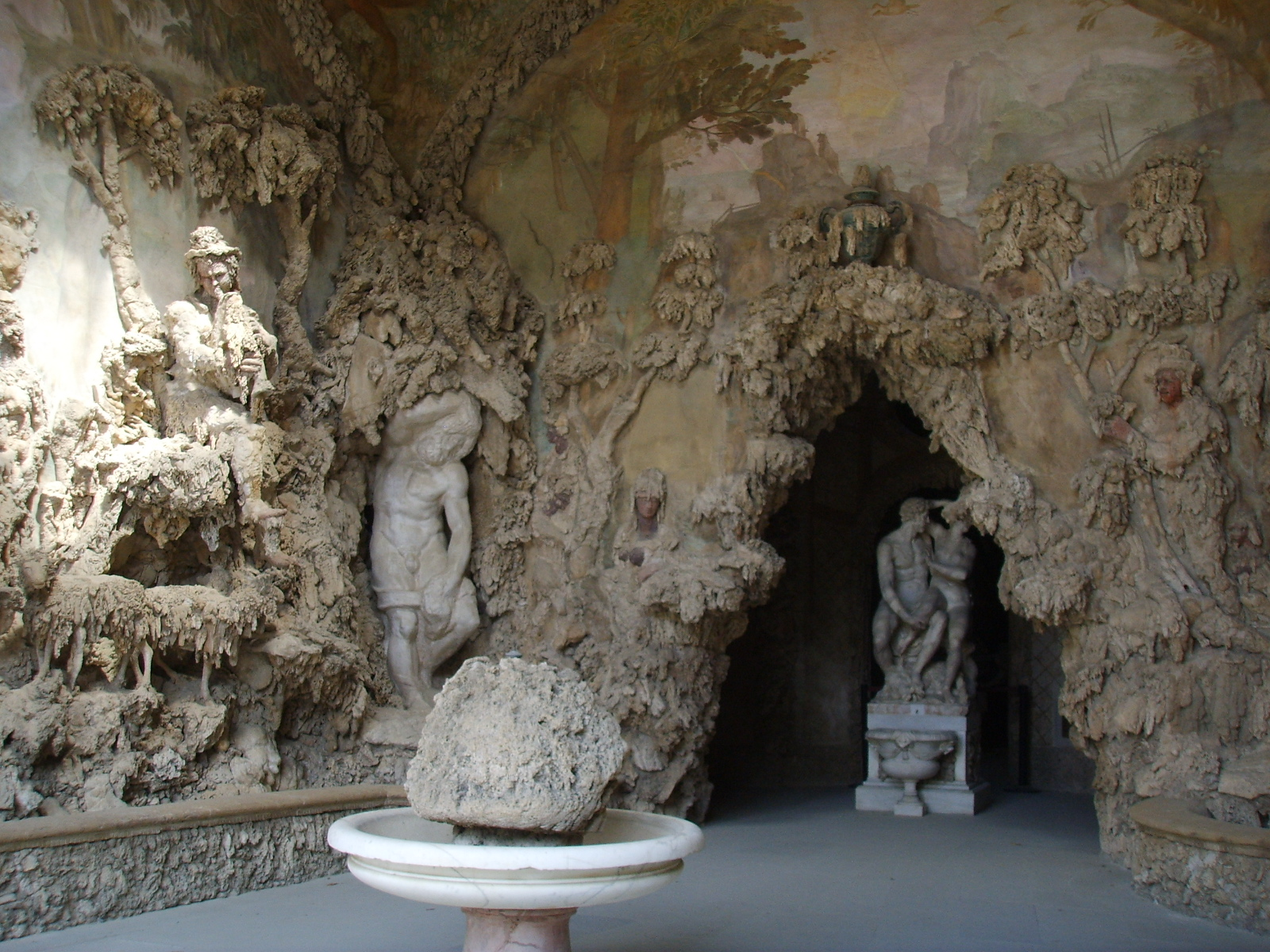 Grotta del buontalenti, prima sala